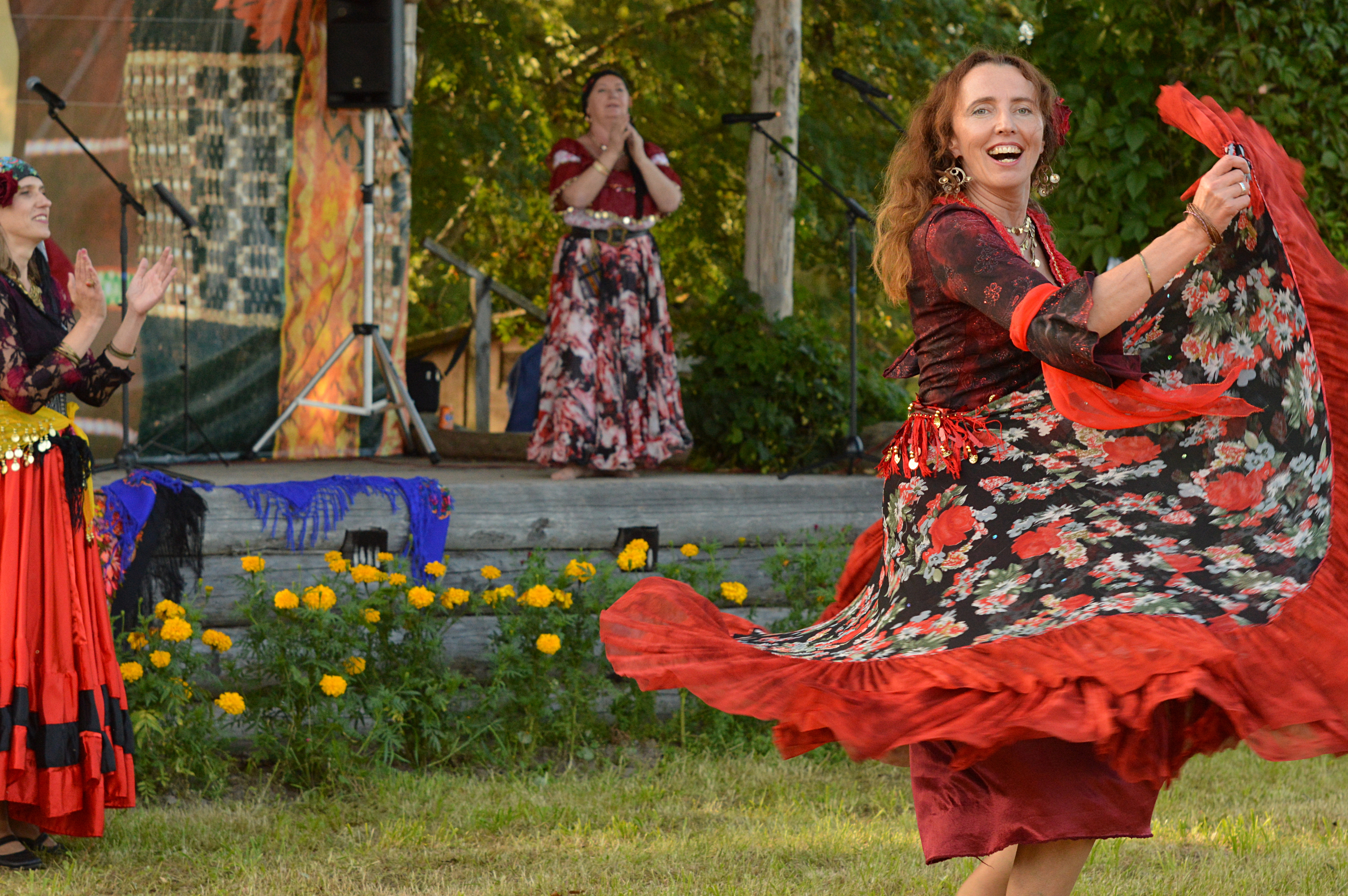 Seto kultuuri festival Radajal. Tartus tegutsev vene mustlastantsu- ja lauluansambel Maljarka. Pille Priks.